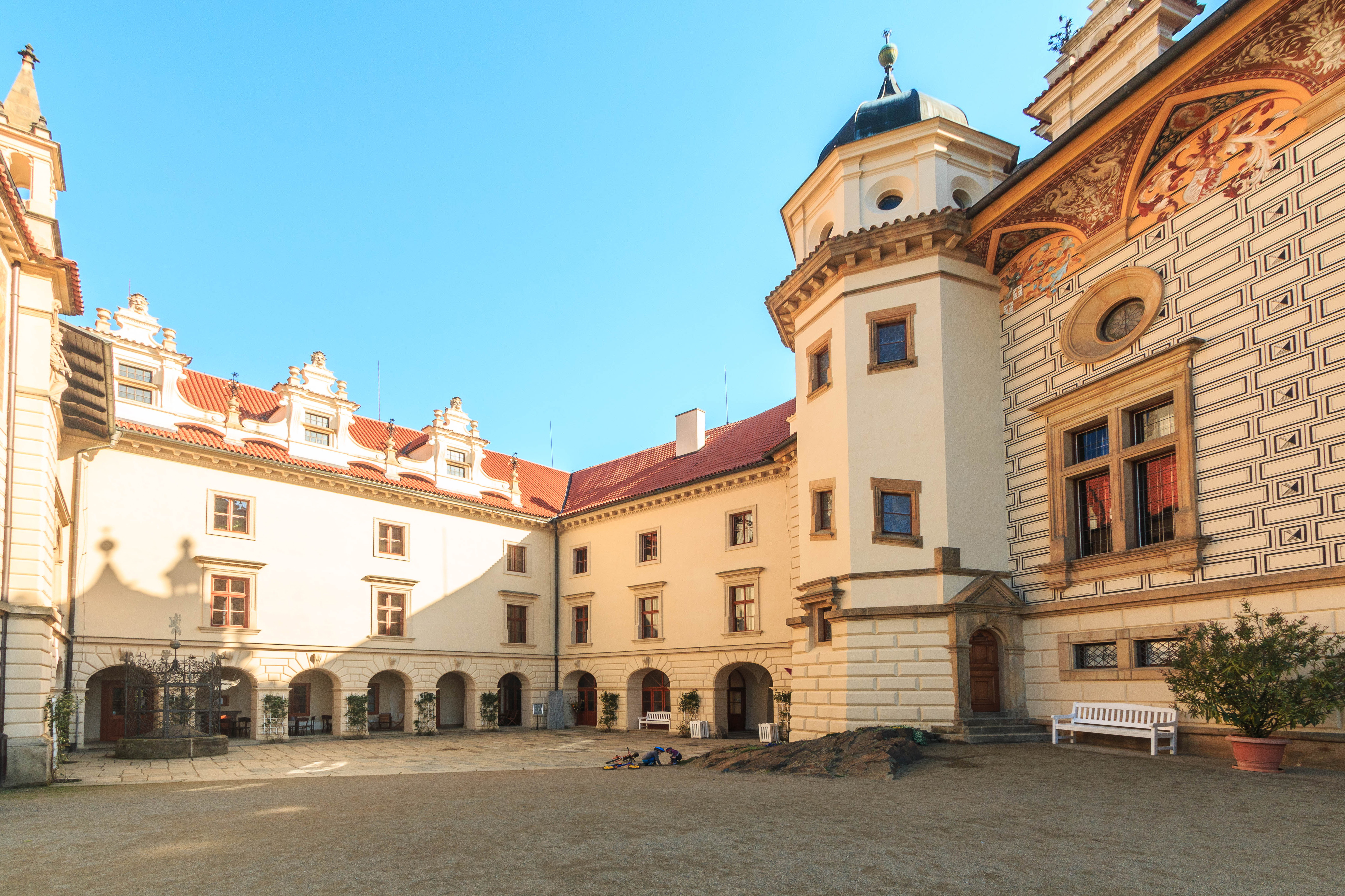 Zámek Průhonice, Průhonice, Osnice, Zdiměřice, Dobřejovice, Průhonice. Project: Chráněná území.